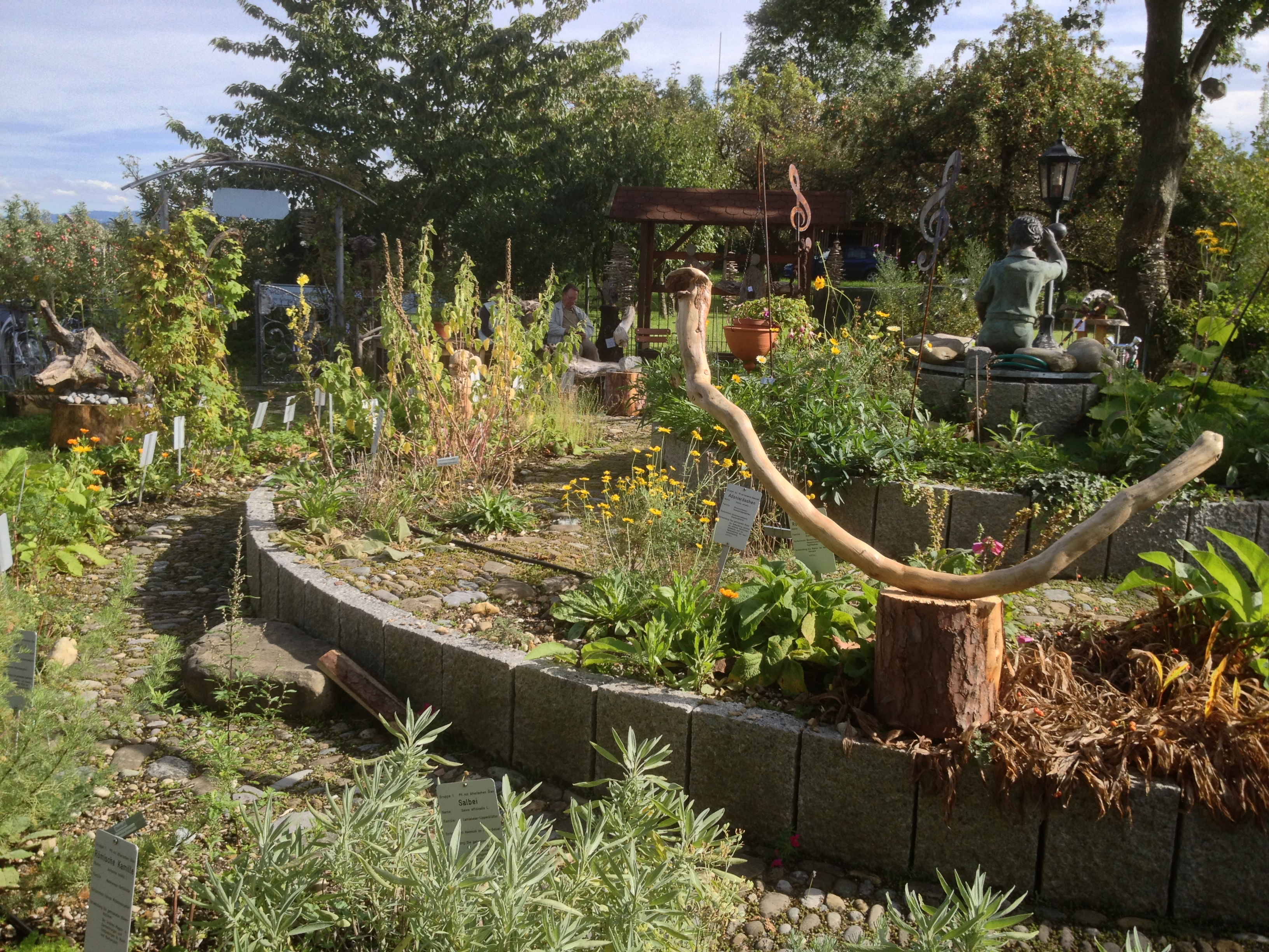 Deutschland - Baden-Württemberg - Bodenseekreis - Kressbronn am Bodensee: "Apothekergarten" auf dem Nunzenberg